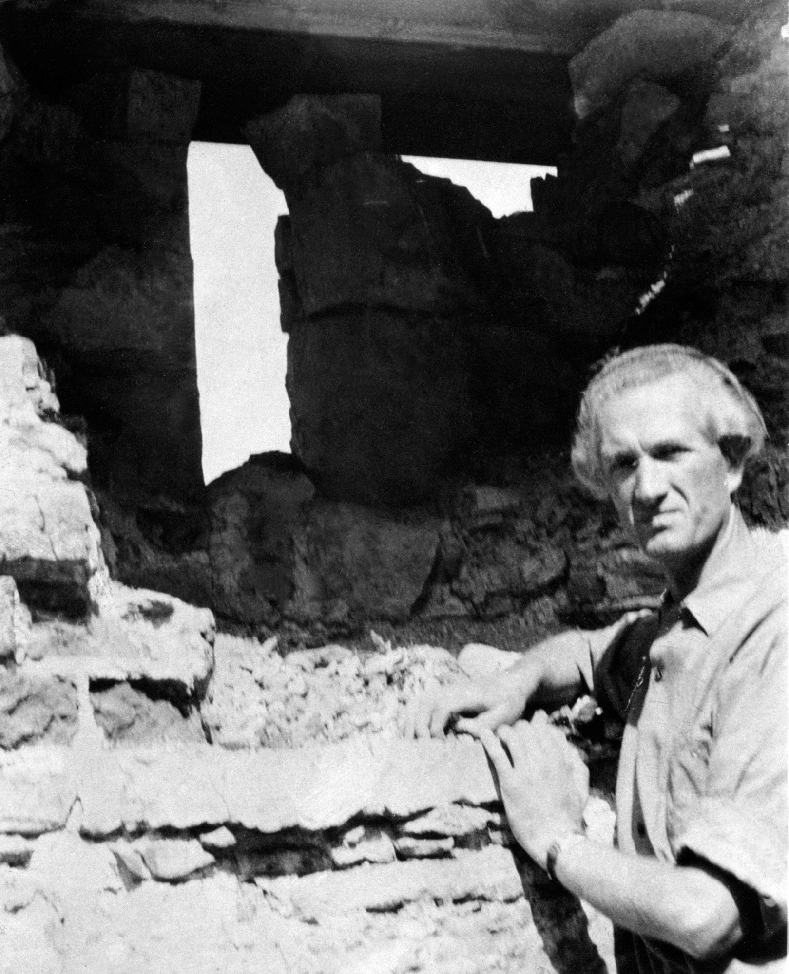 Håkon Christie under arkeologiske utgravninger ved sydfløyen av borggården på Domkirkeodden, Hamar, i 1960. Foto: Hamar Stifstidende. Fra Domkirkeoddens fotoarkiv i Digitalt museum. Inventarnummer: 0401-07297.